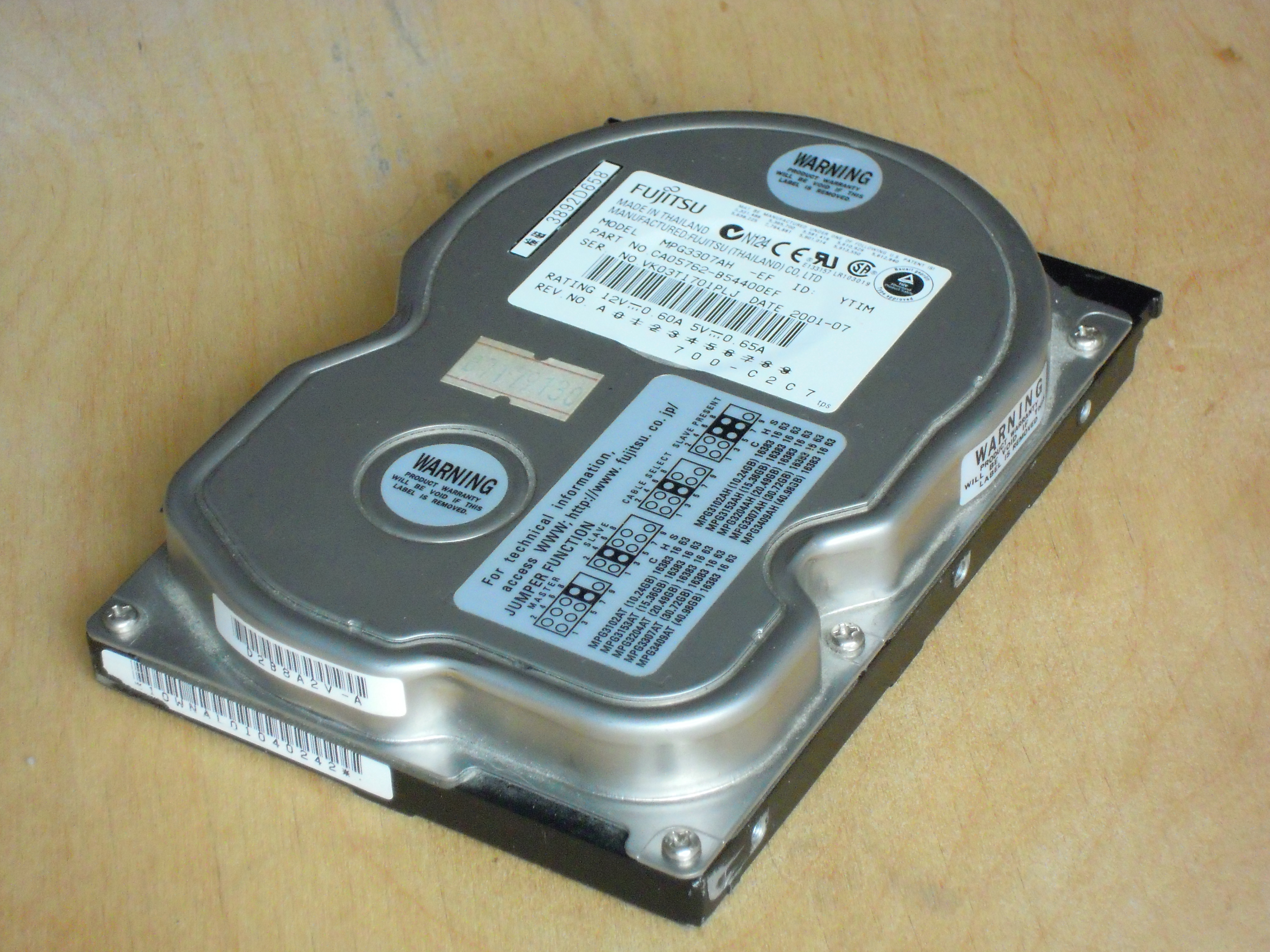 Diskaparato «Fujitsu MPG3307AH» (supra flanko).